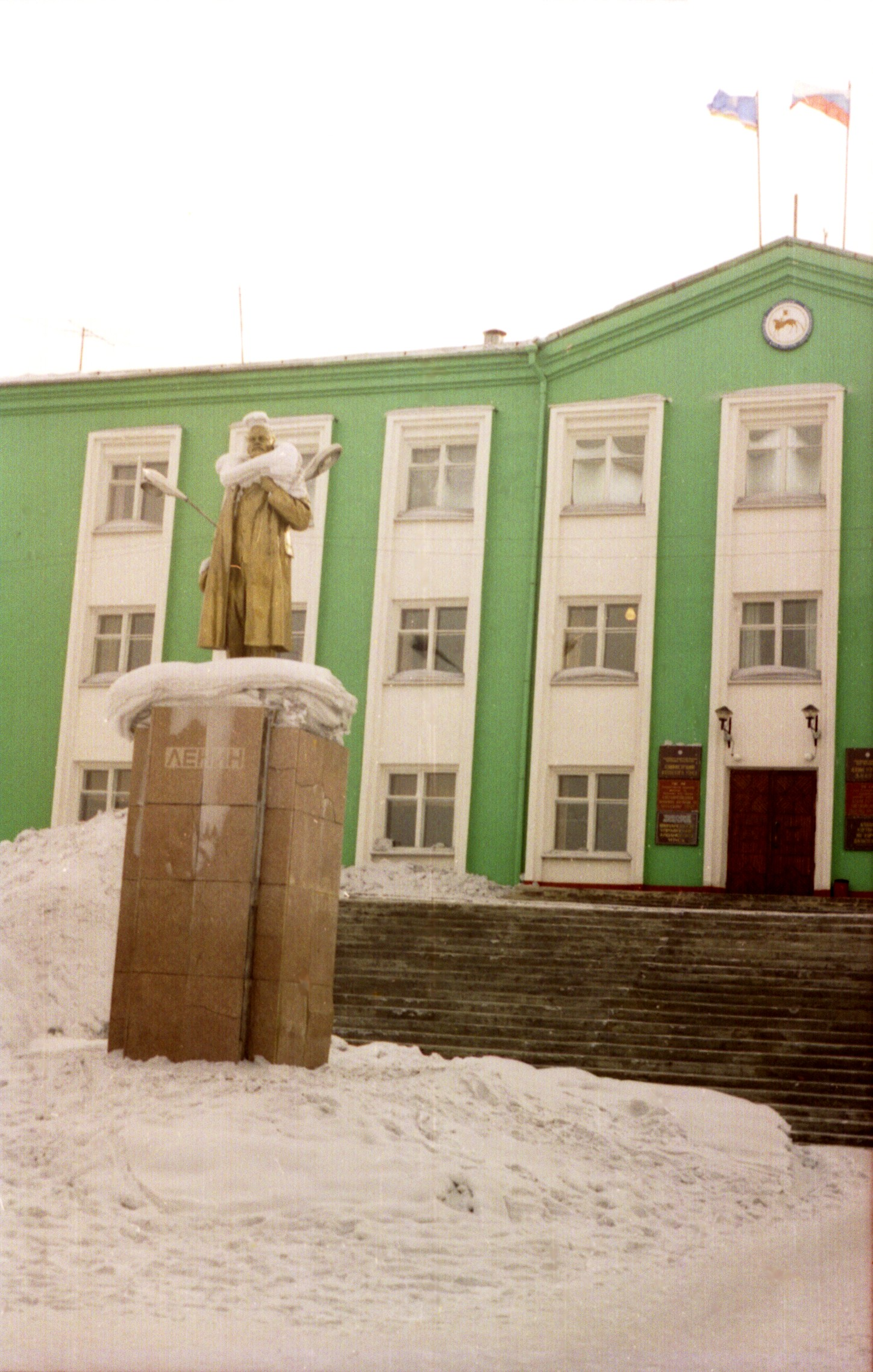 Памятник Ленину в г. Алдан, Якутия (Саха) перед зданием горадминистрации. Снимал 23.02.2000 г , при температуре на улице около -40 . Ленин получился "в шубе". Плёнка была AGFA обращаемая, на такую же и на ORWO снимал много лет слайды ранее. В июле 2004 г. плёнку отсканировал и позже загрузил, пока только в личные облачные хранилища.